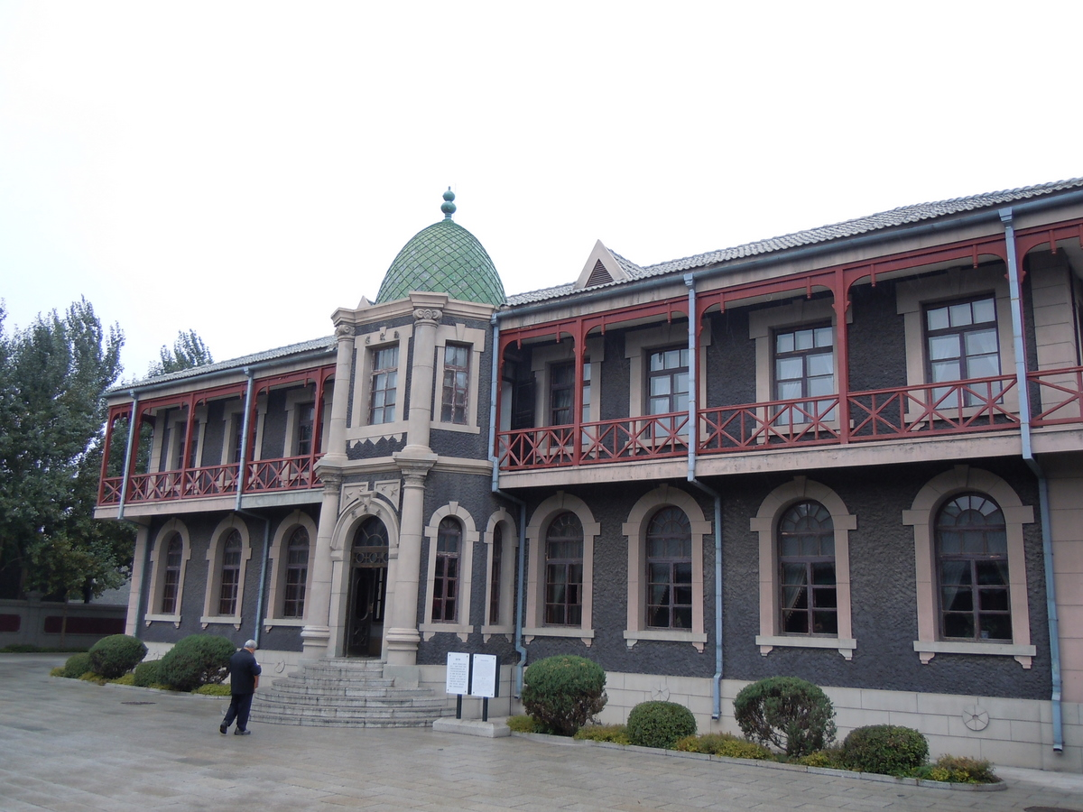 长春伪满皇宫，勤民楼